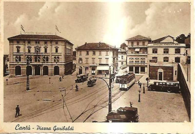 Vista di piazza Garibaldi a Cantù. Si notano a sinistra i binari a scartamento metrico della tranvia Como-Cantù-Asnago, e a destra i binari a scartamento ordinario del capolinea della tranvia Monza-Meda-Cantù, sui quali è in sosta un'elettromotrice.